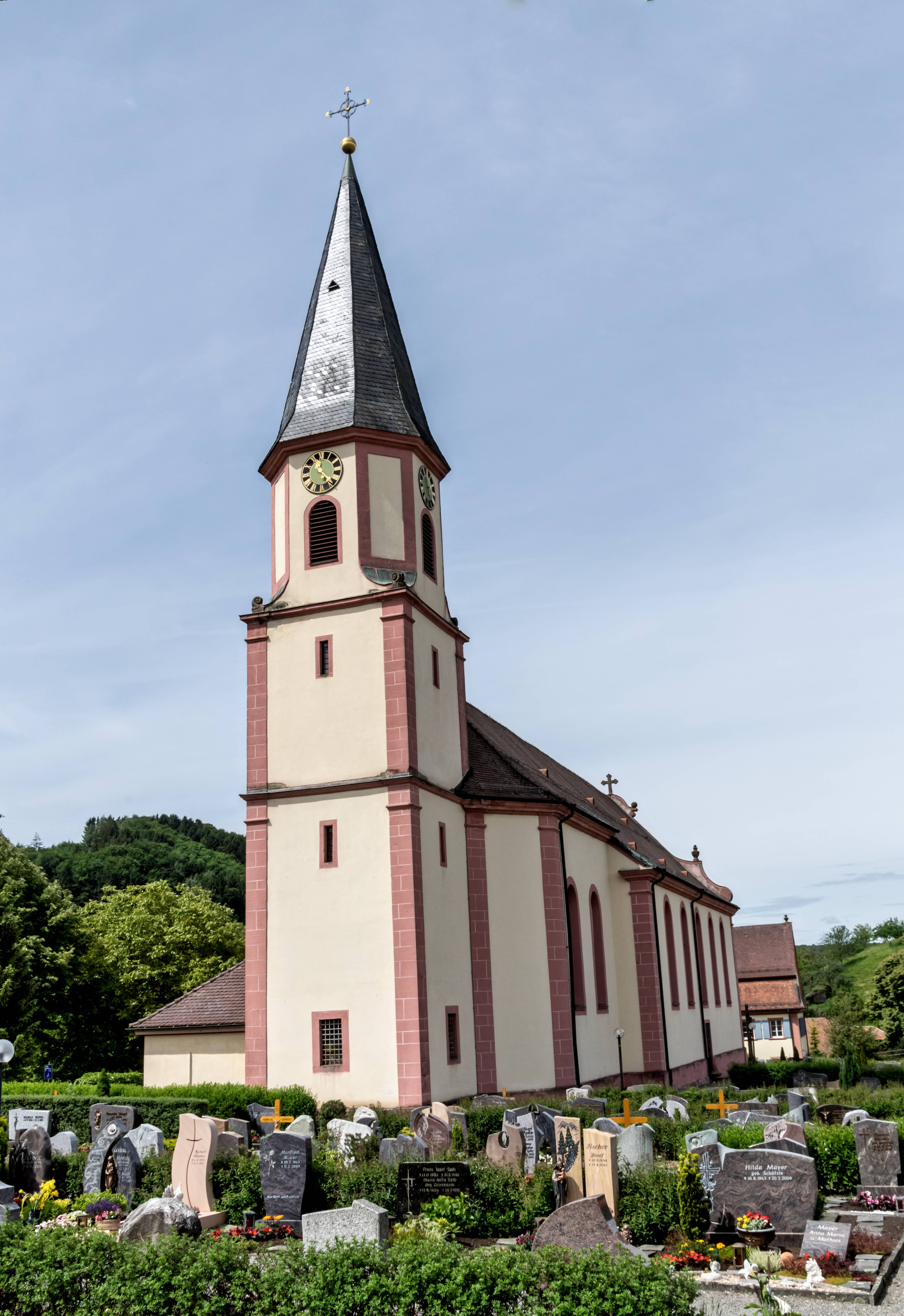 Bilder von der Kirche St. Romanus in Schweighausen Die Kirche von Osten